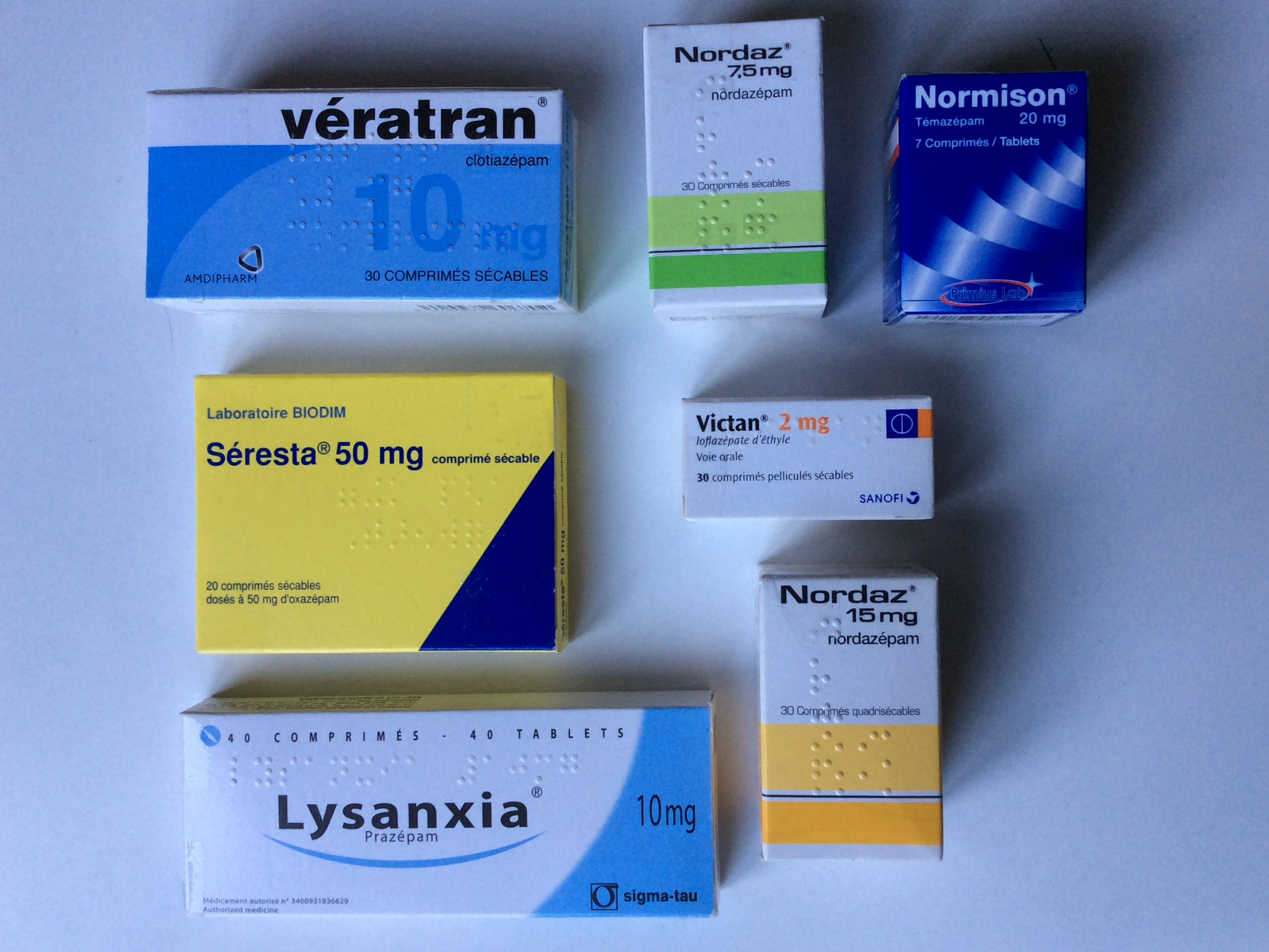 boites de benzodiazépines peu prescrites, à tort